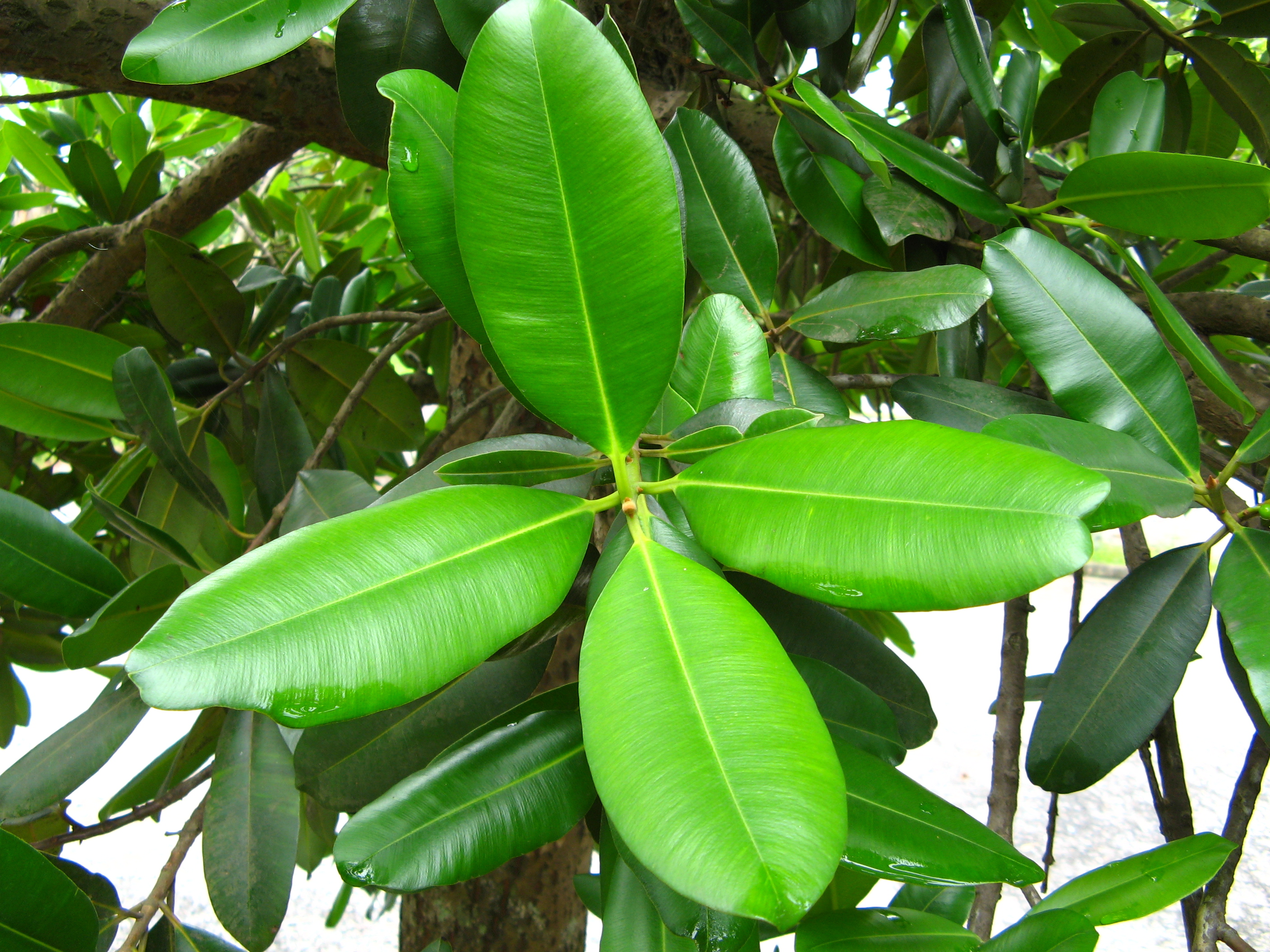 guanandi leaves